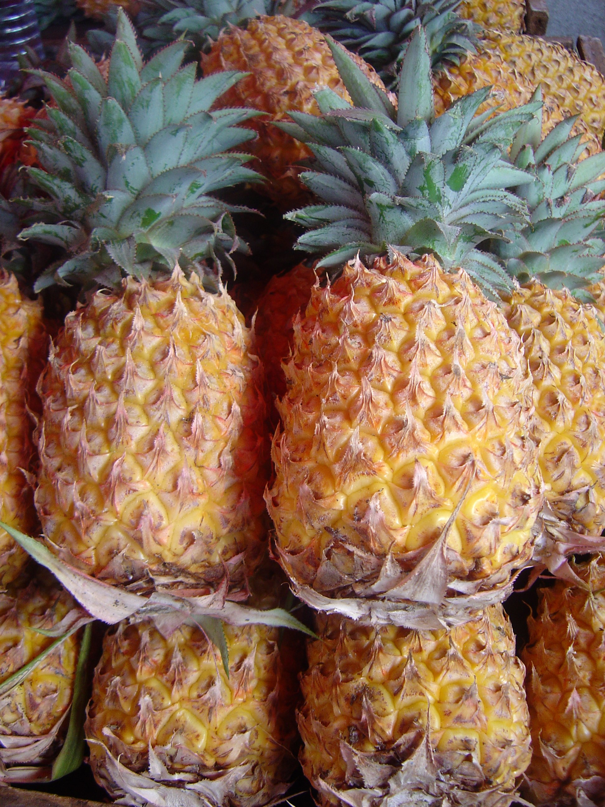 Ananas comosus